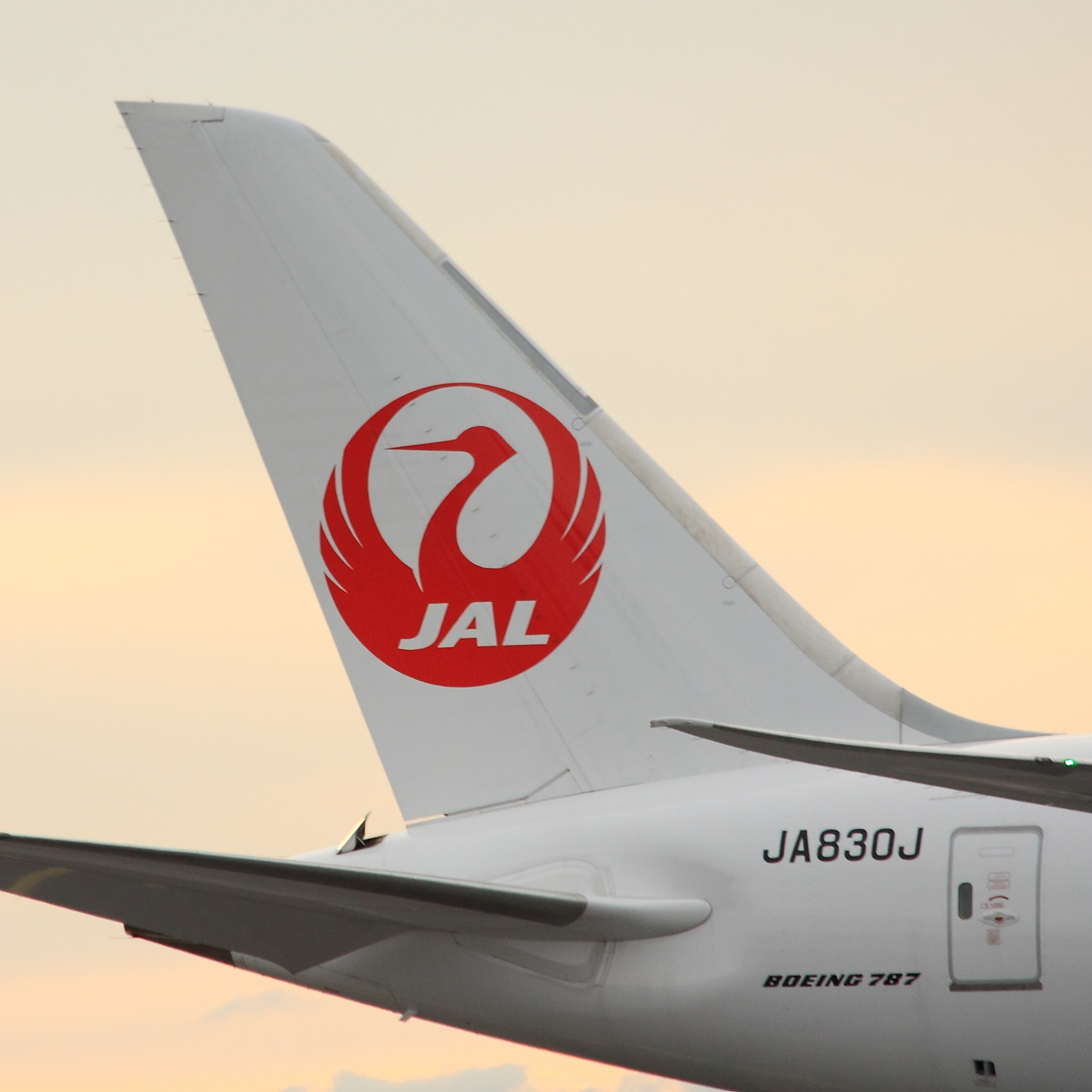 JA830J Japan Airlines Dreamliner Helsinki-Vantaa (HEL) gate 38